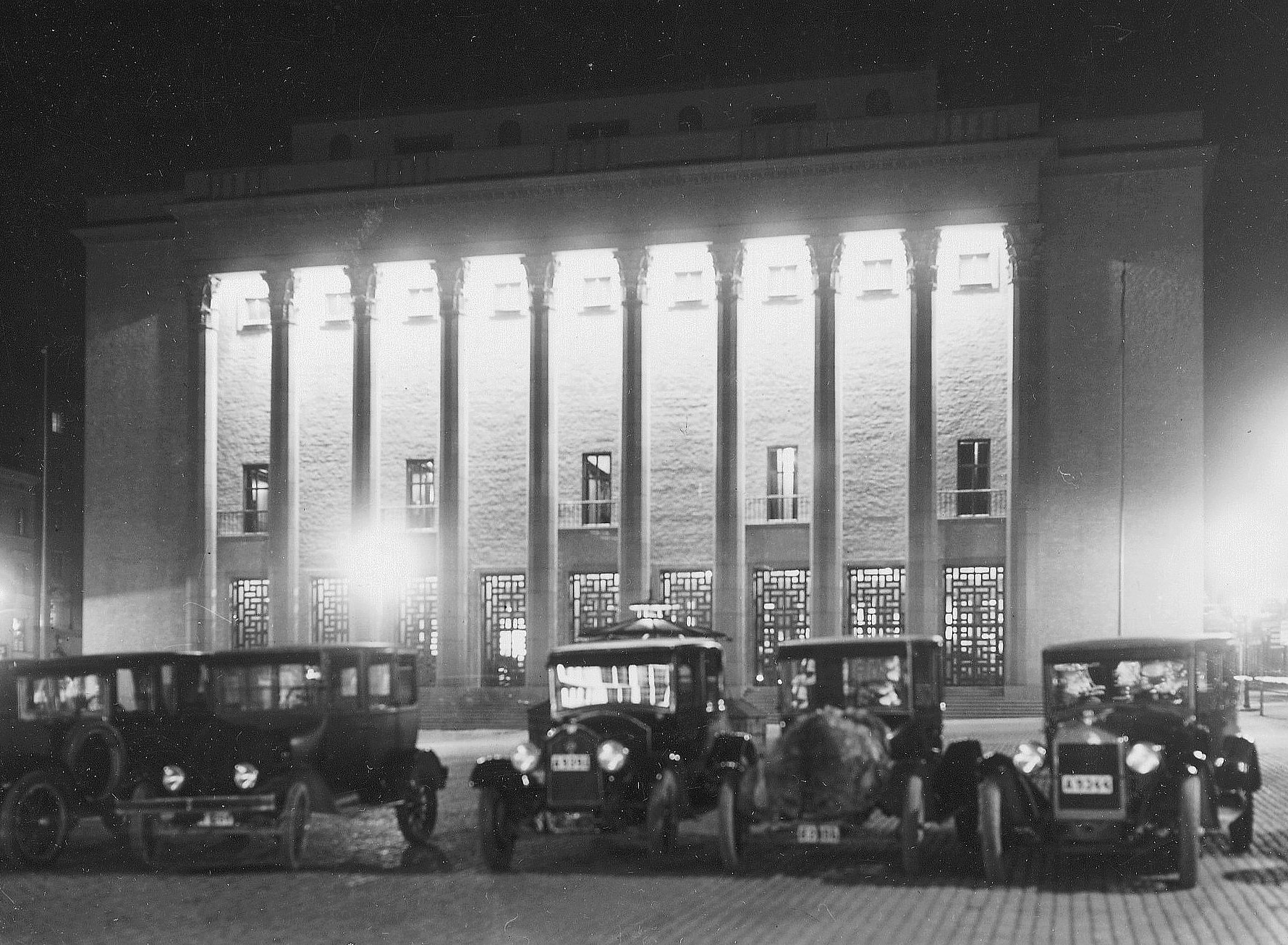 Konserthuset i Stockholm, invigning 7 april 1926